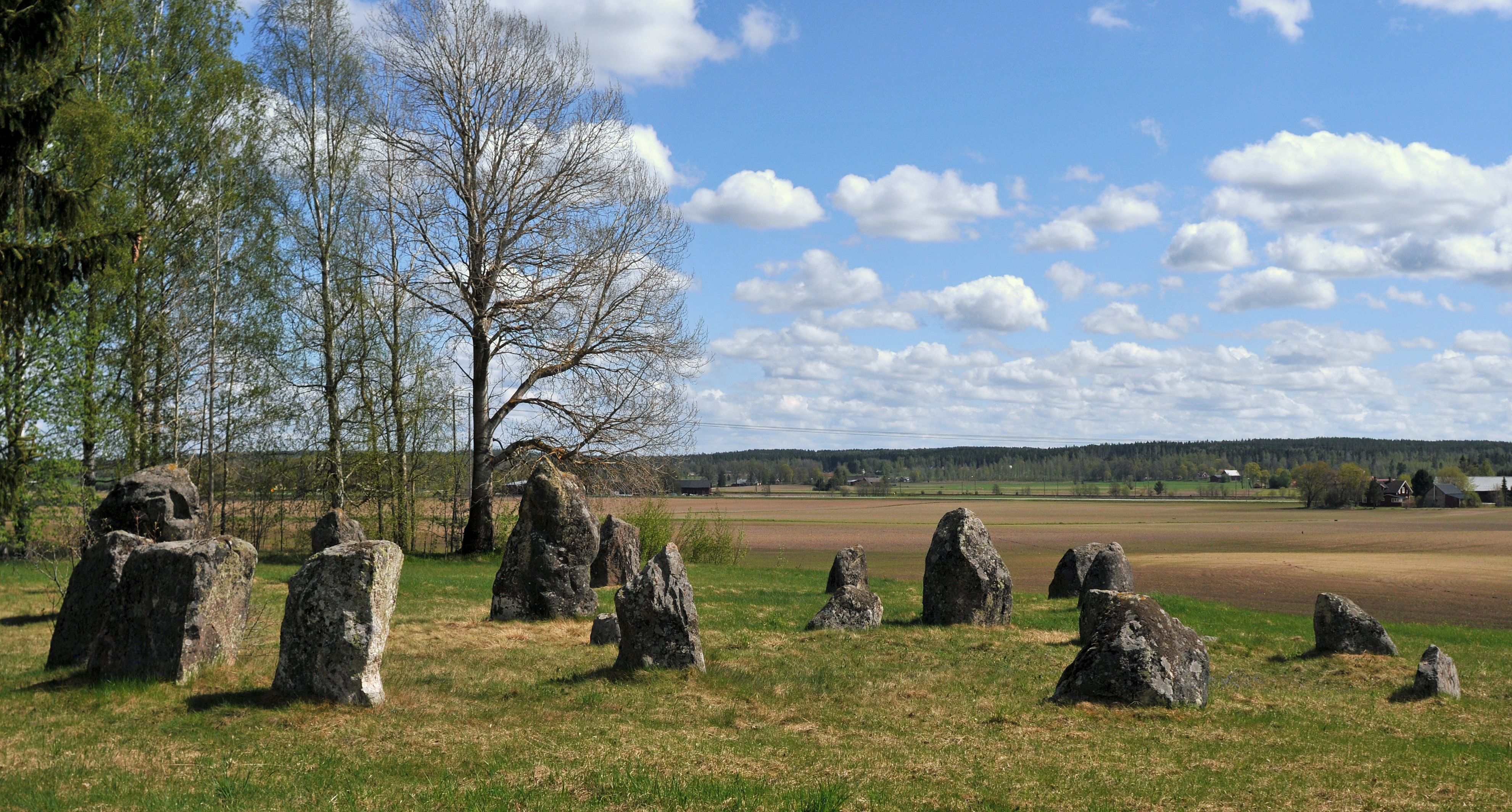 Norrby stenar är ett gravfält från folkvandringstid (ca 500 eKr) beläget intill gamla vägen mellan Hallsberg och Sannahed i Hallsbergs kommun, Örebro län